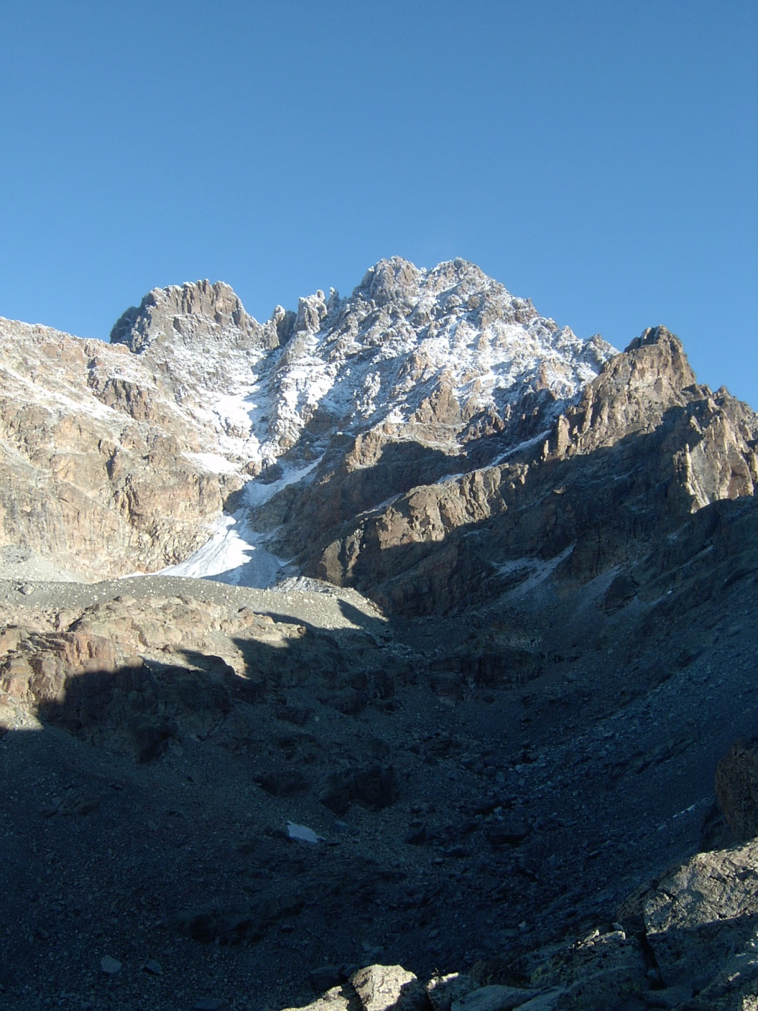 Vetta del Monviso dal colle delle Sagnette